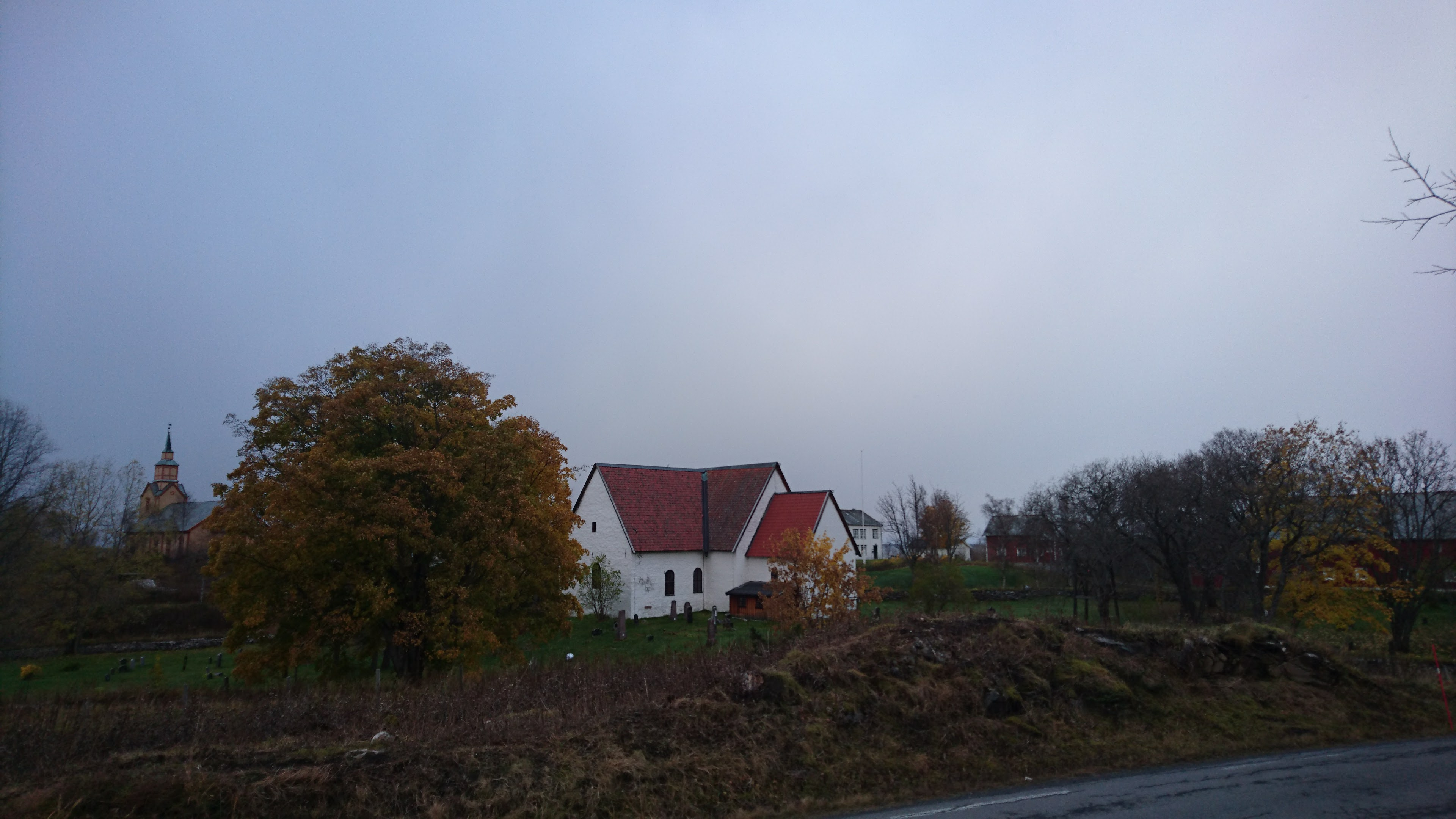 Gildeskål Kirkested